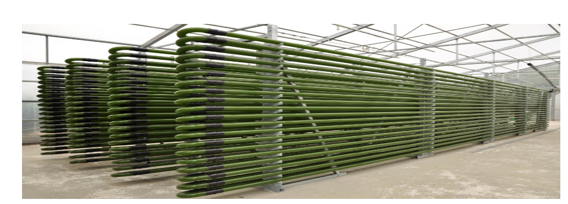 Figura 7 - Fotobiorreator tubular horizontal